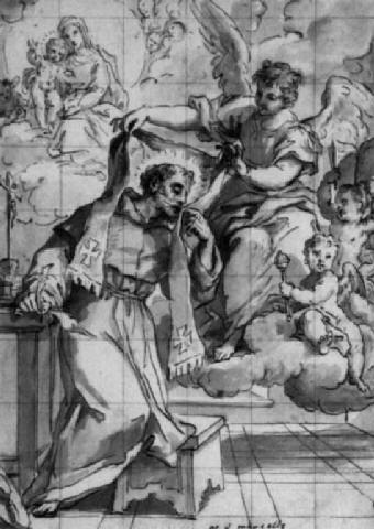 San Marcelo recibiendo los estigmas del Espíritu Santo